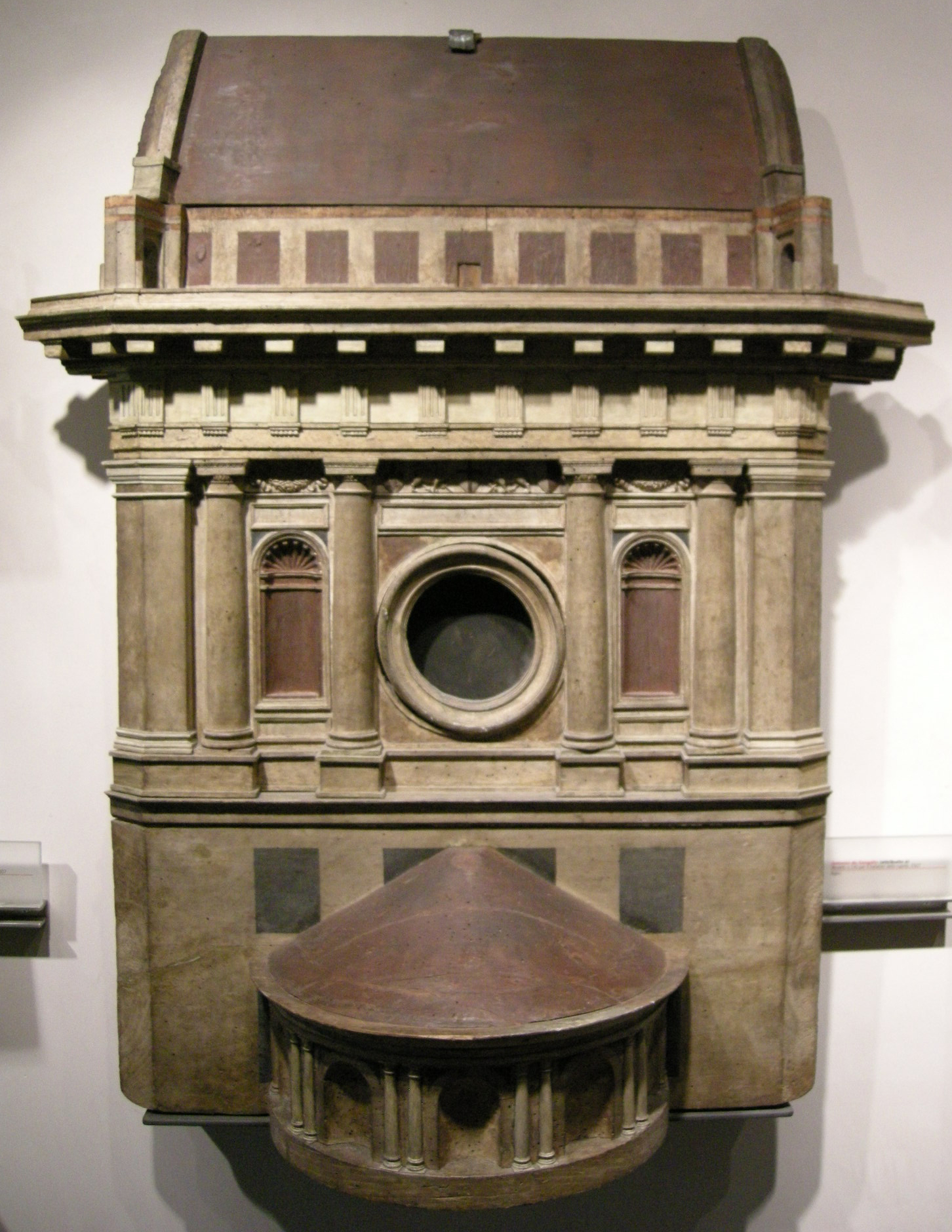 Modello per il ballatoio, attr. antonio da sangallo